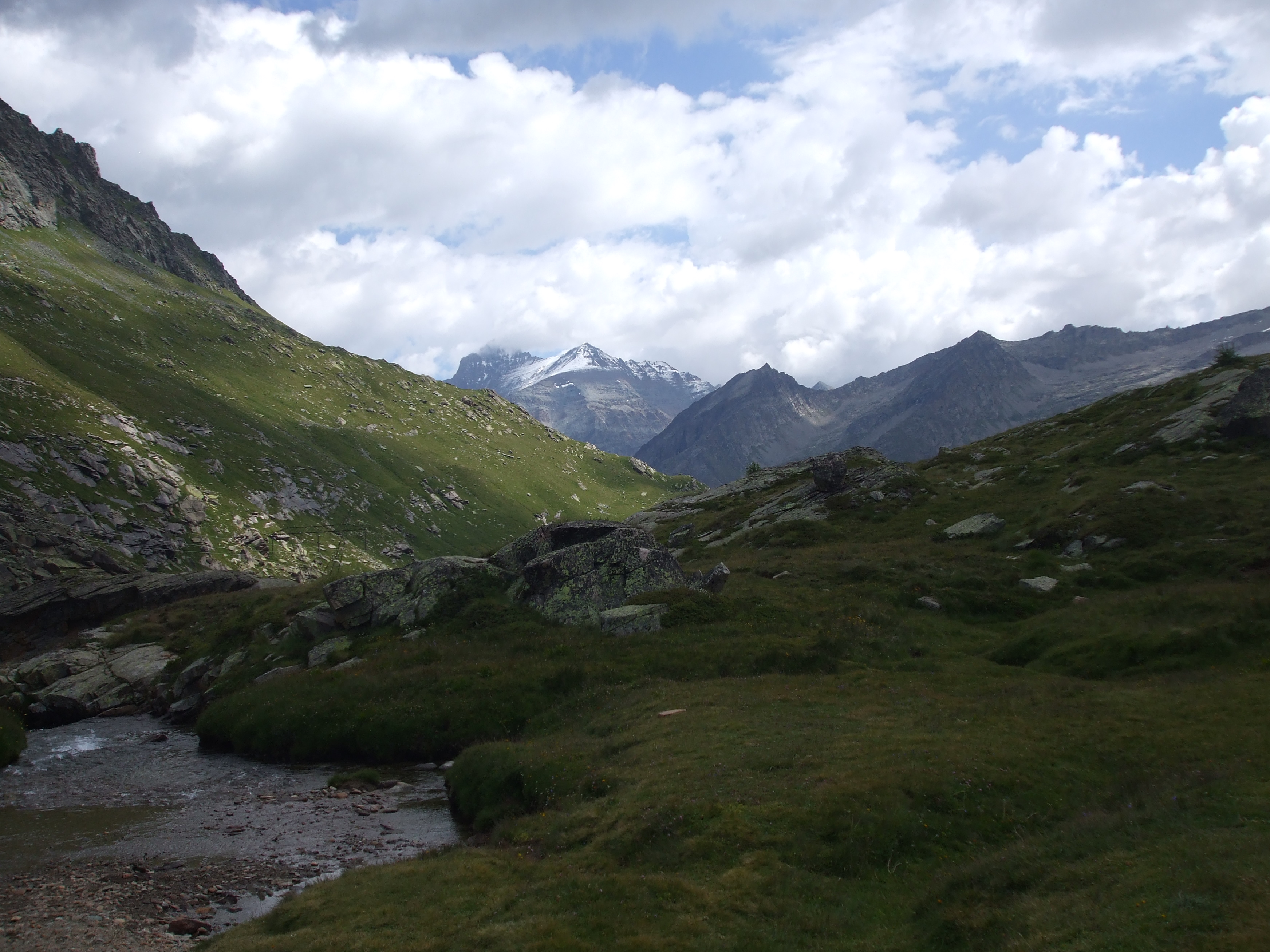 Altopiano del Nivolet, foto fatta lungo il sentiero che porta al rifugio Savoia